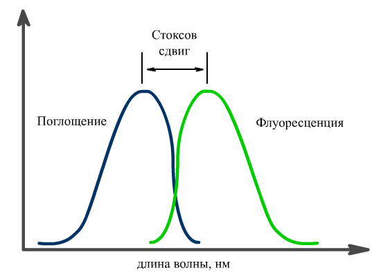 Иллюстрация понятия "Стоксов сдвиг".